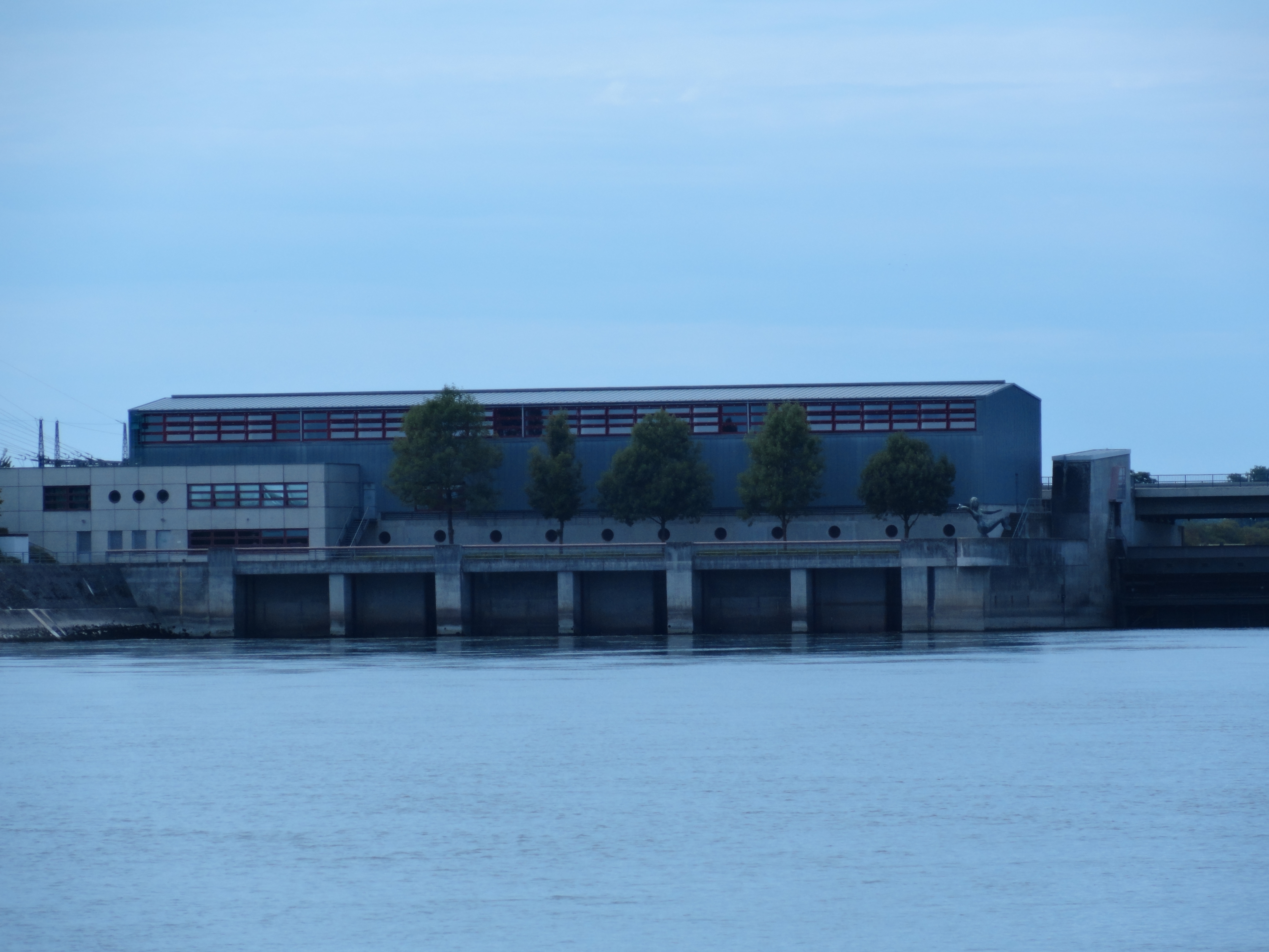 Maschinenhaus des Wasserkraftwerk Straubing vom Unterwasser aus